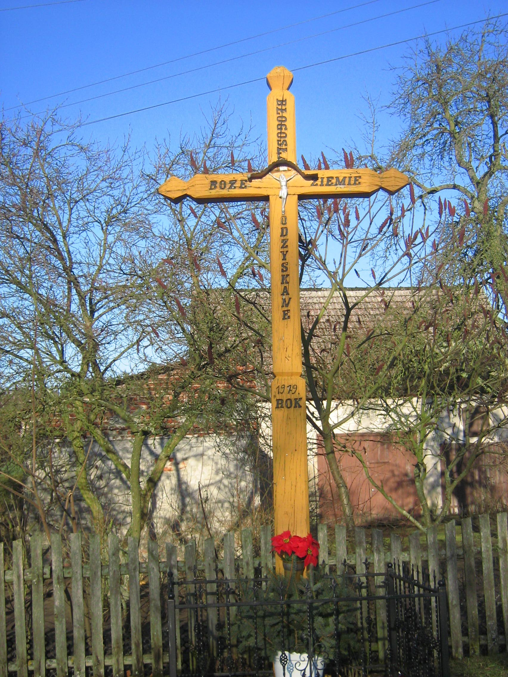 Krzyż z 1979 roku przy drodze w Kodrąbku